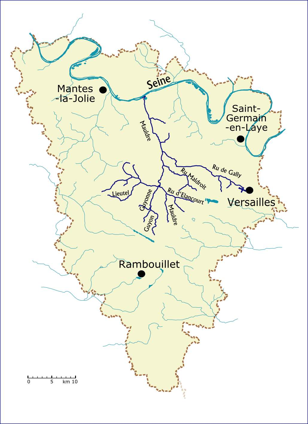 Position du bassin de la Mauldre dans le réseau hydrographique des Yvelines (France)